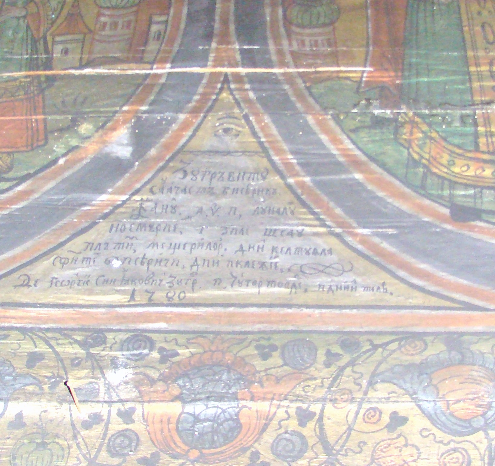 Biserica de lemn din Sartăș